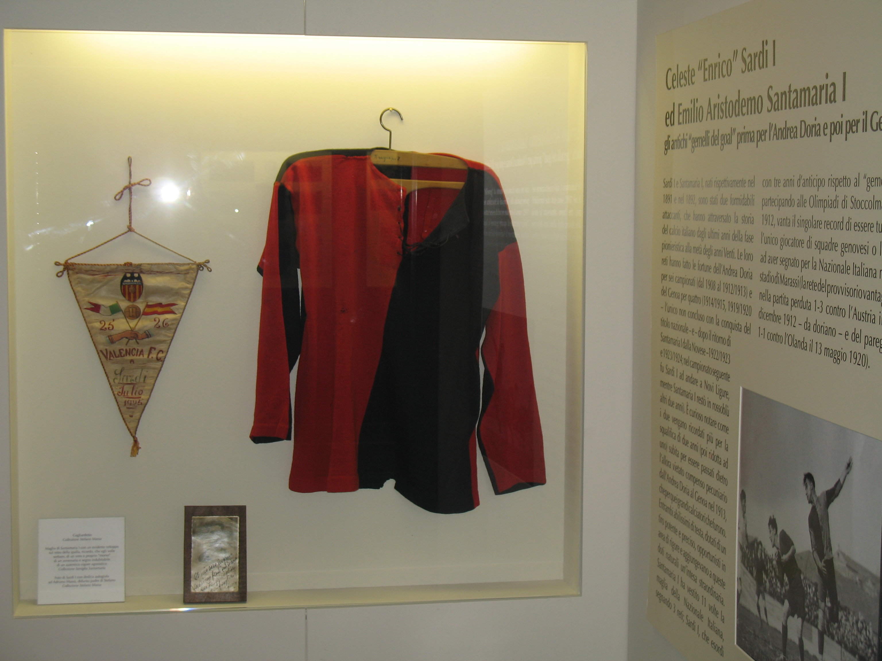 Museo della Storia del Genoa, Genova, Italia.